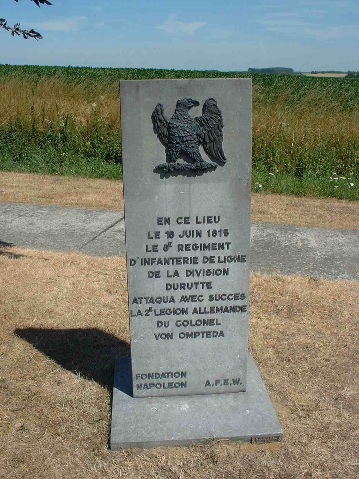 Stèle au 8ème régiment d'infanterie de ligne sur le champs de bataille de Waterloo.